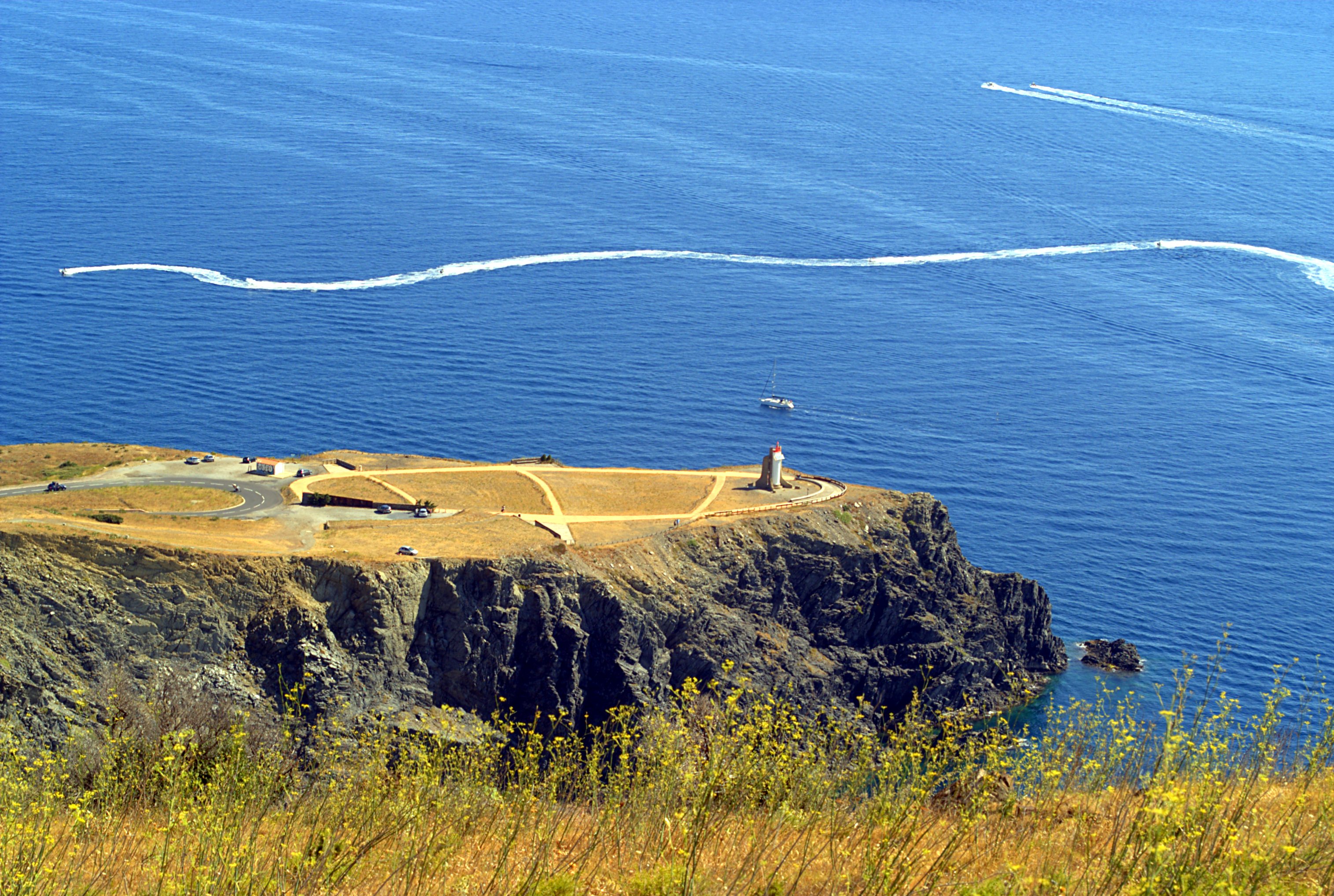 Cap Cerbère depuis le Puig de Cervera, Cerbère (Pyrénées-Orientales, Languedoc-Roussillon, France), Portbou (Haut-Ampurdan, Gérone, Catalogne, Espagne)